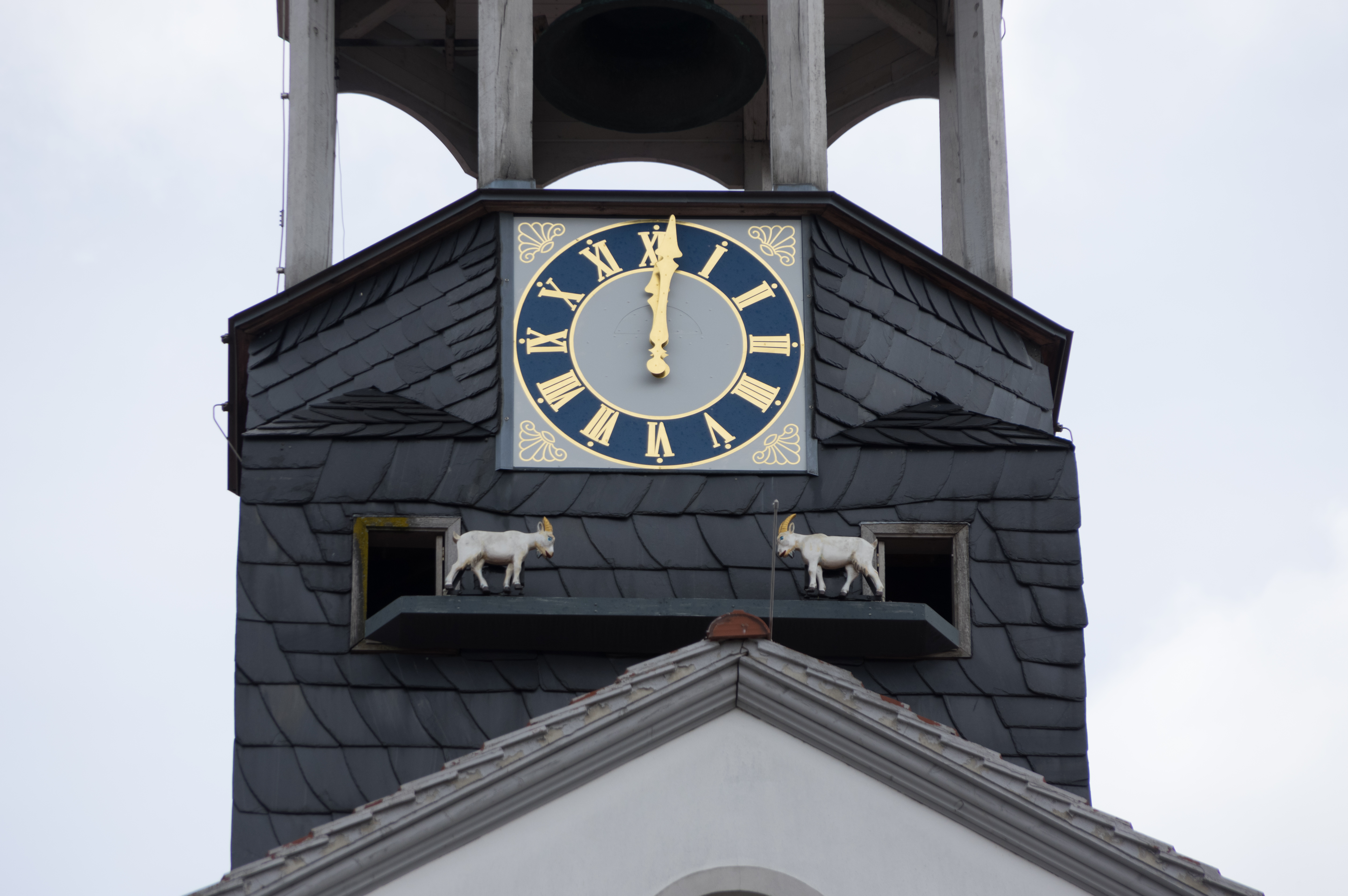 Bad Düben in Sachsen. Zu jeder vollen Stunde sind zwei Ziegen unter der Tür sichtbar.